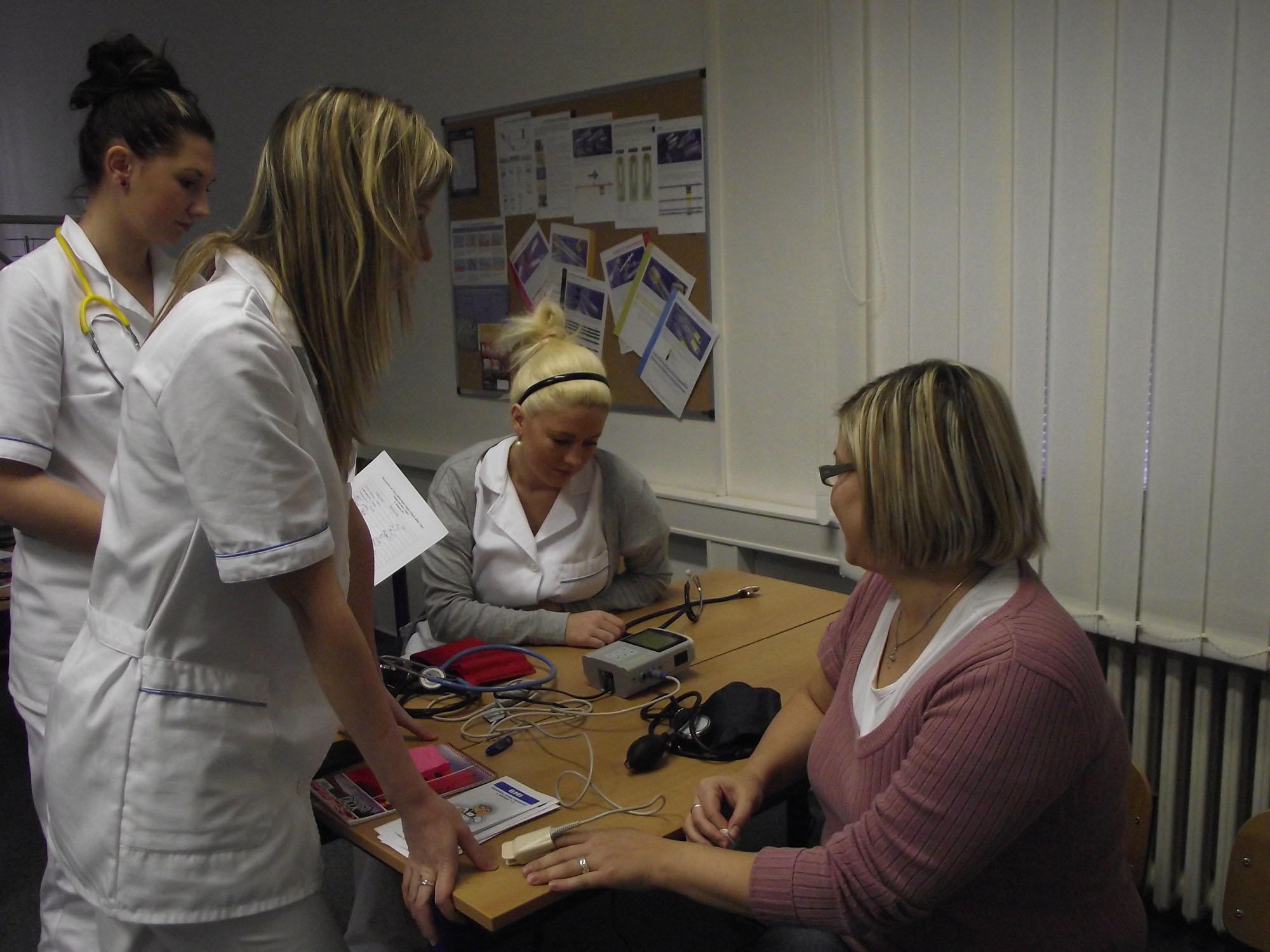 Den prezence